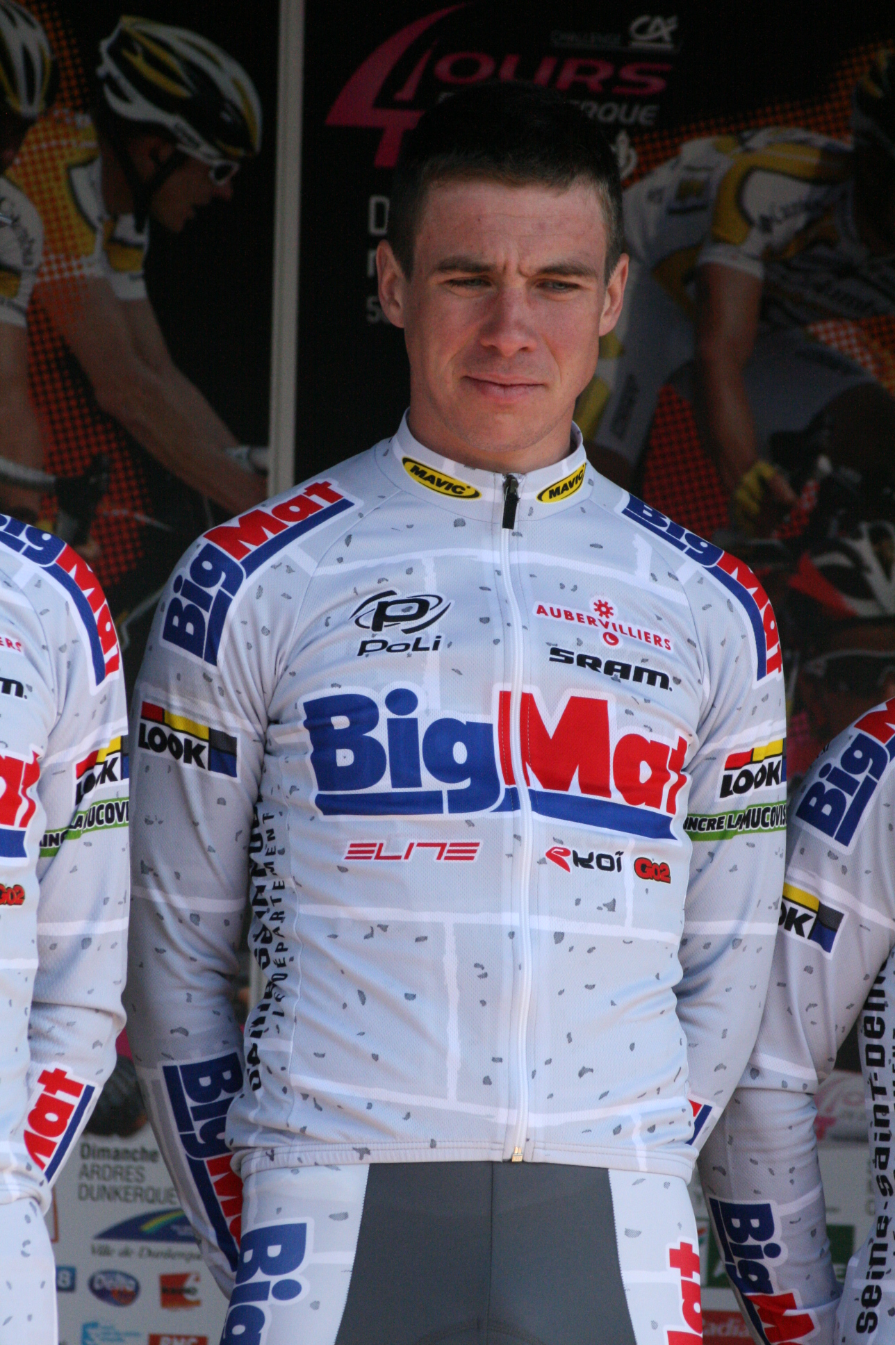 Johan Mombaerts lors de la présentation des équipes des 4 jours de Dunkerque 2010